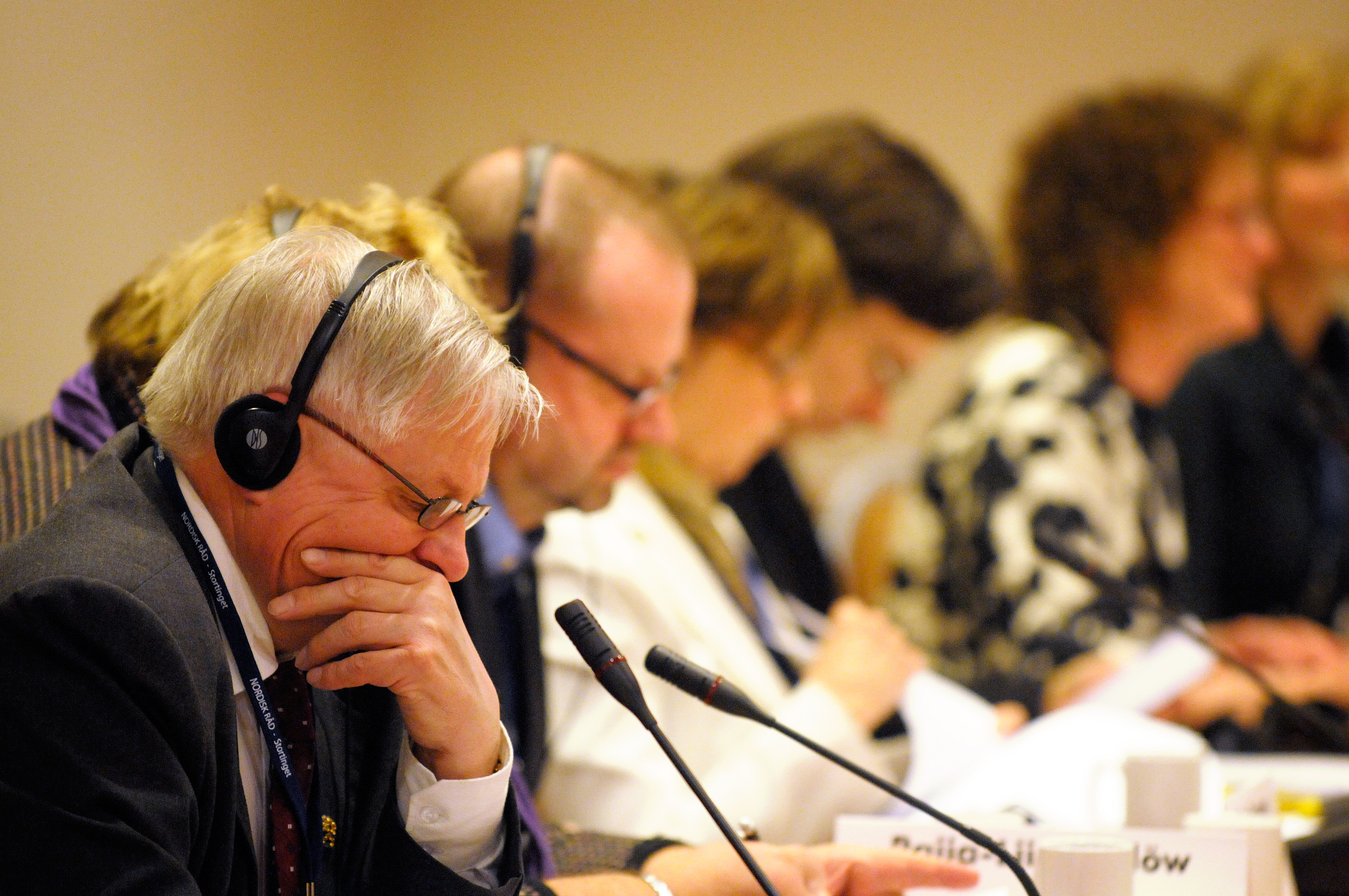 Lauri Oinonen (cent) förbereder sig inför mittengruppens möte på Nordiska rådets möte i Stavanger. 2008-04-14